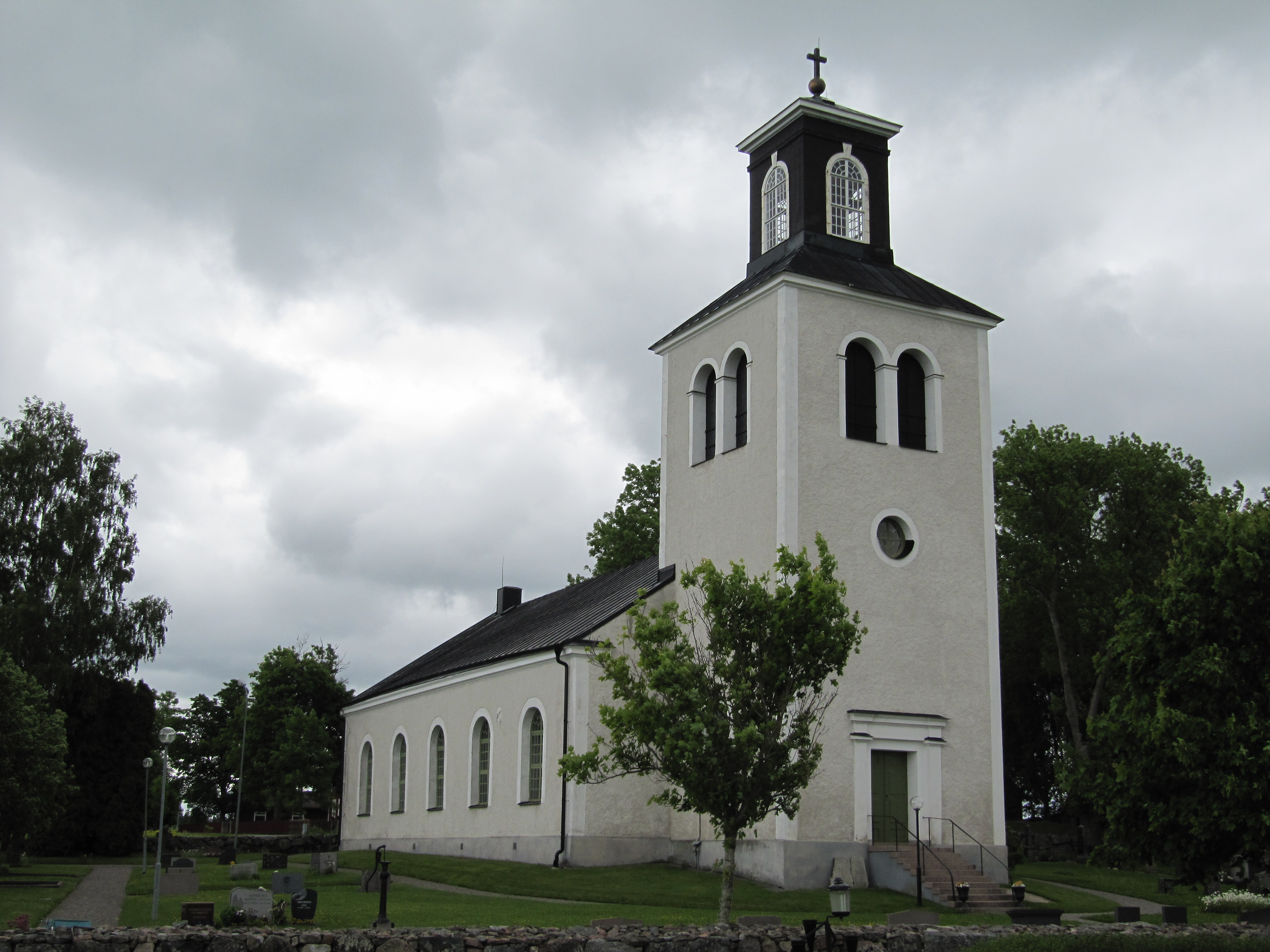 Hagby kyrka